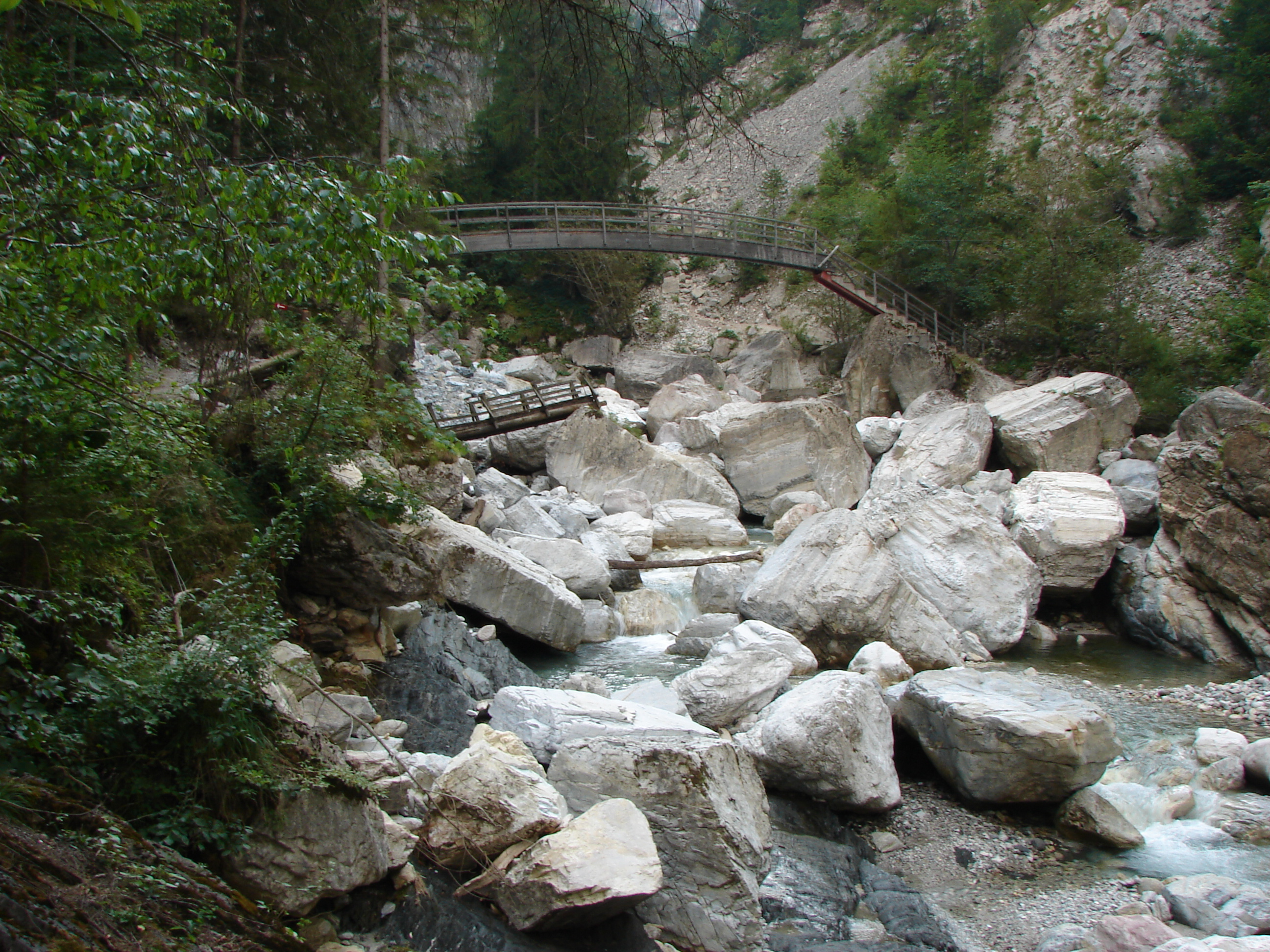 Garnitzenklamm